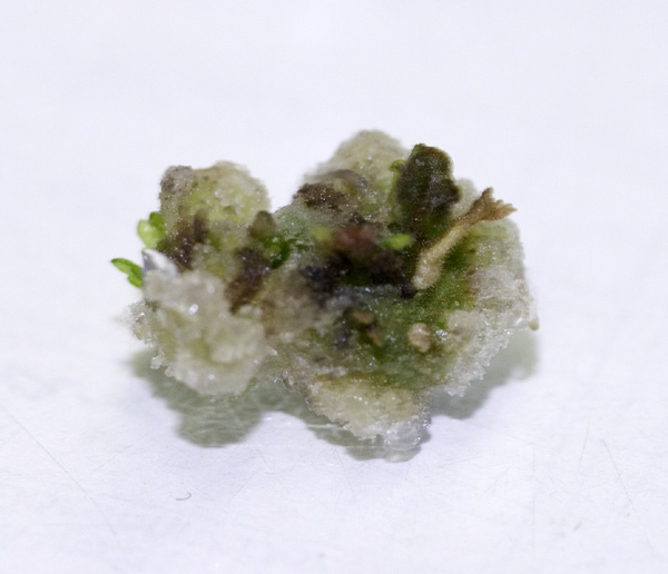 Kallusgewebe von Pelargonium-Zonale-Hybriden aus Sproßspitzenkultur in vitro, ca. 6 Wochen alt.